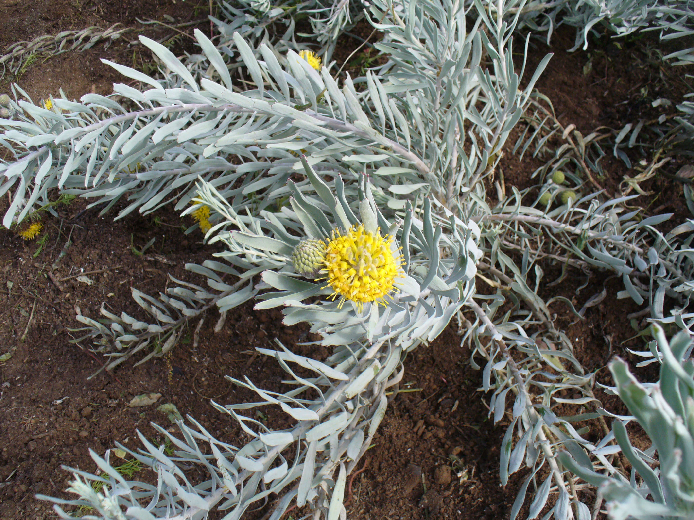 Saldanah pincushion